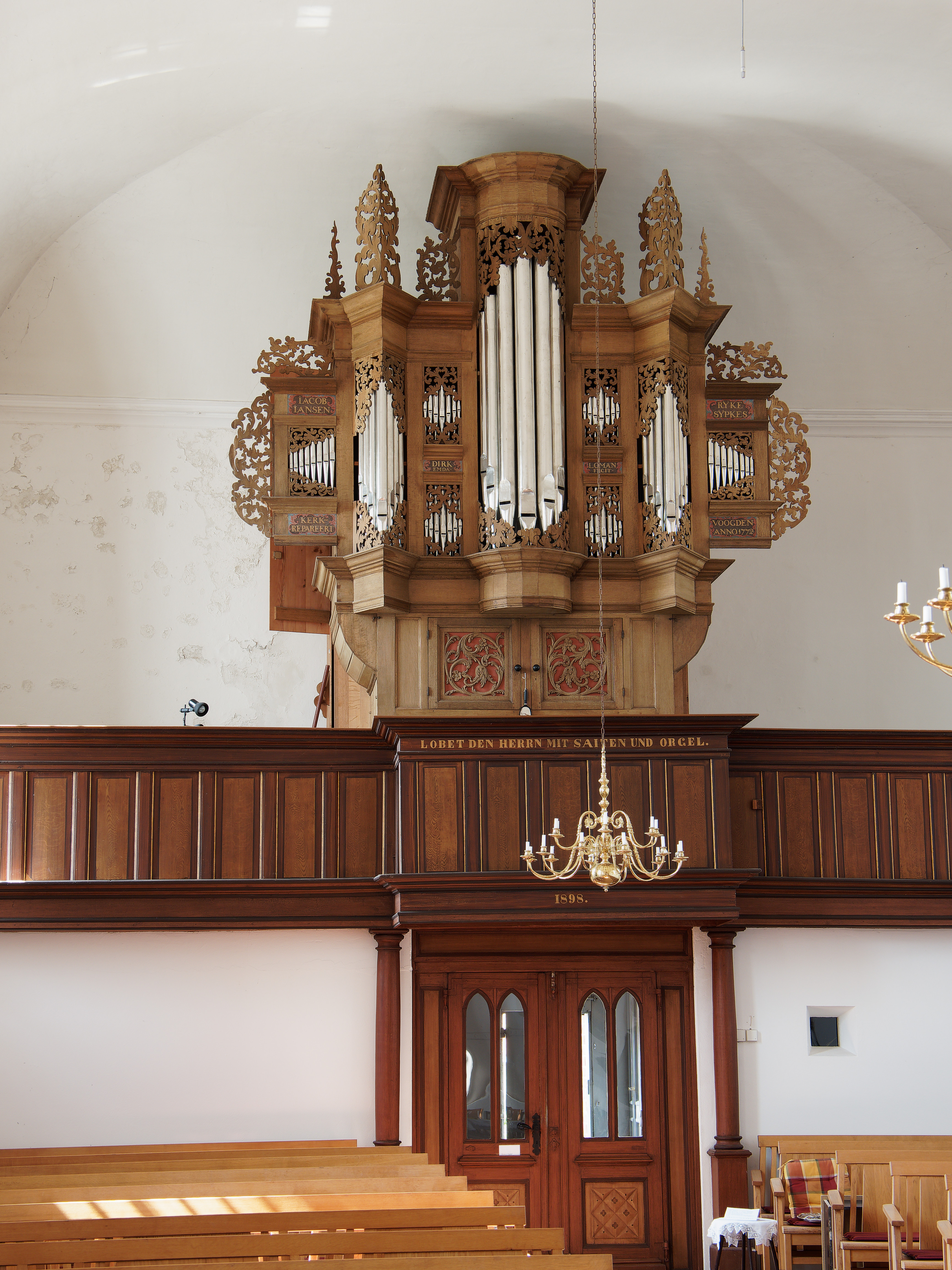 Die Orgel von 1694 in der ev. reformierten Kirche (Kreuzkirche) in Pilsum (Ostfriesland).